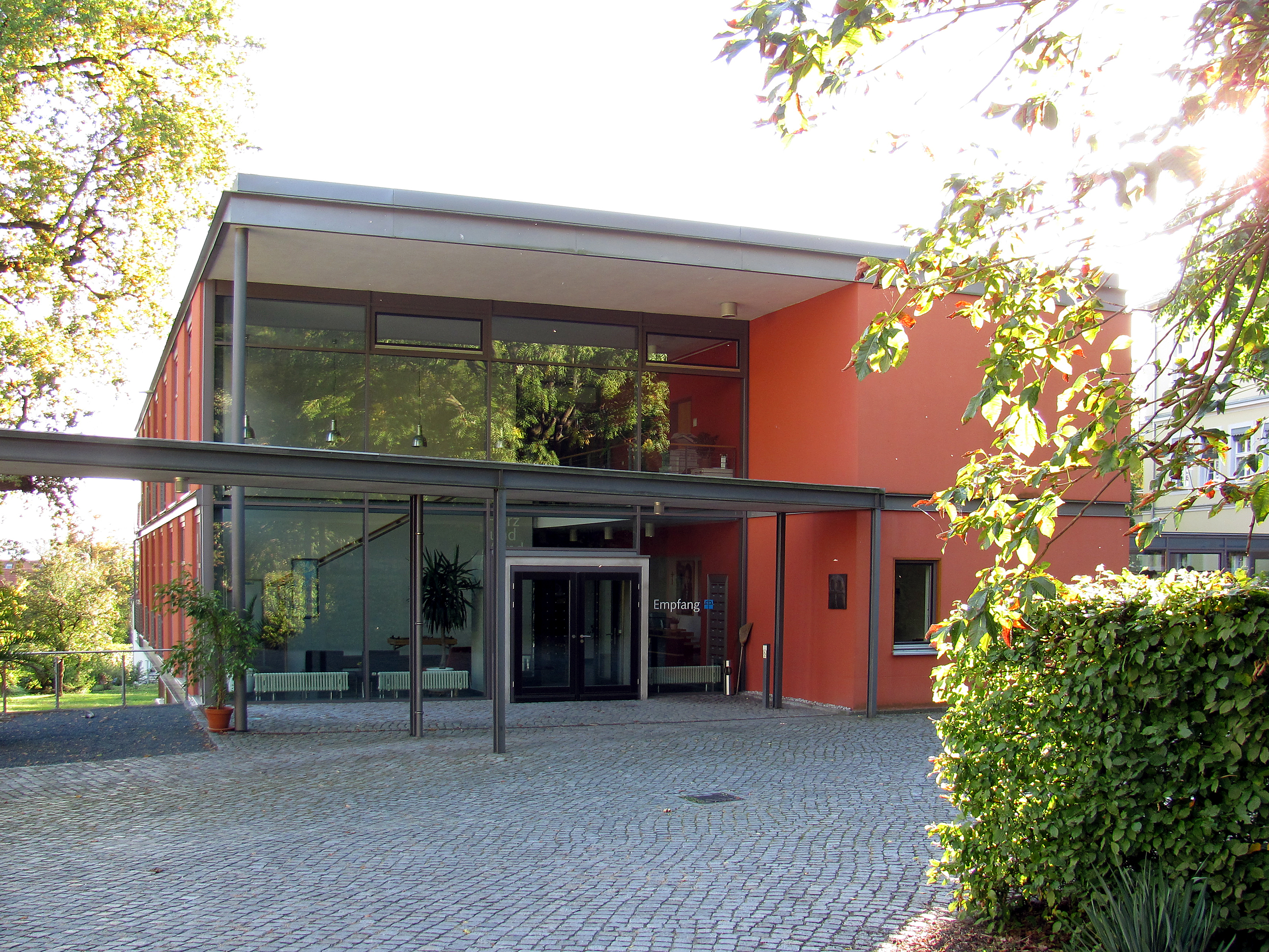 Radebeul, Tagungsgebäude Obere Bergstraße 1